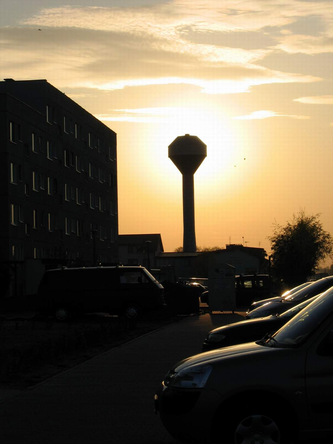 Słupca - wieża ciśnień "Karol", widok z Osiedla Niepodległości. (foto. Marcin Majdecki)